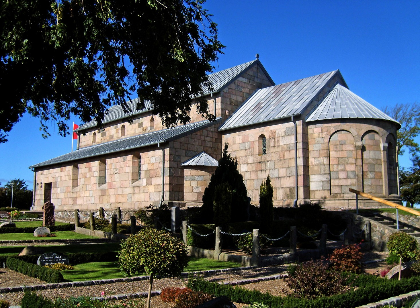 fra sydøst